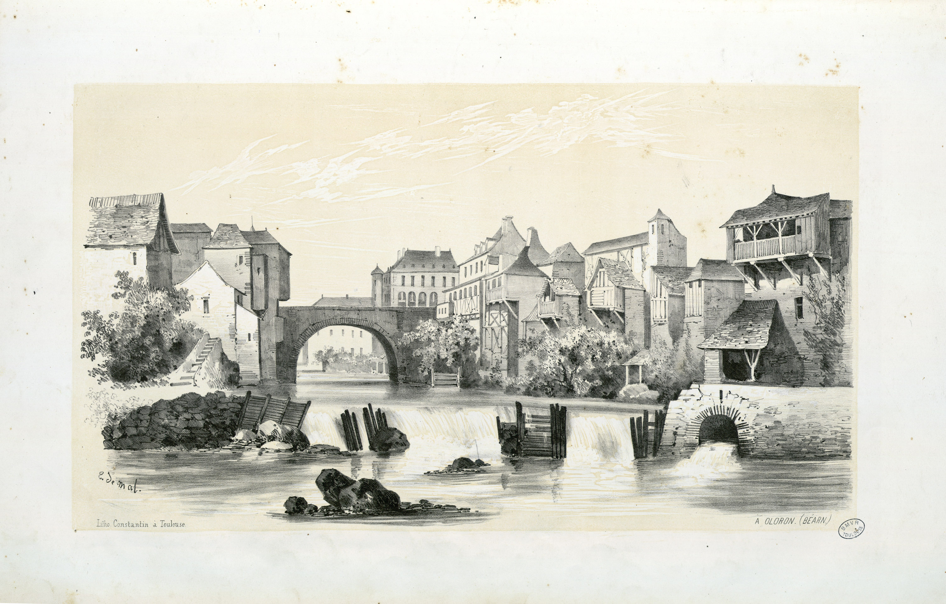 Fait partie d'un recueil de 15 planches lithographiées en camaïeu avec titre lithographié Ancely, René (1876 - 1966). Possesseur